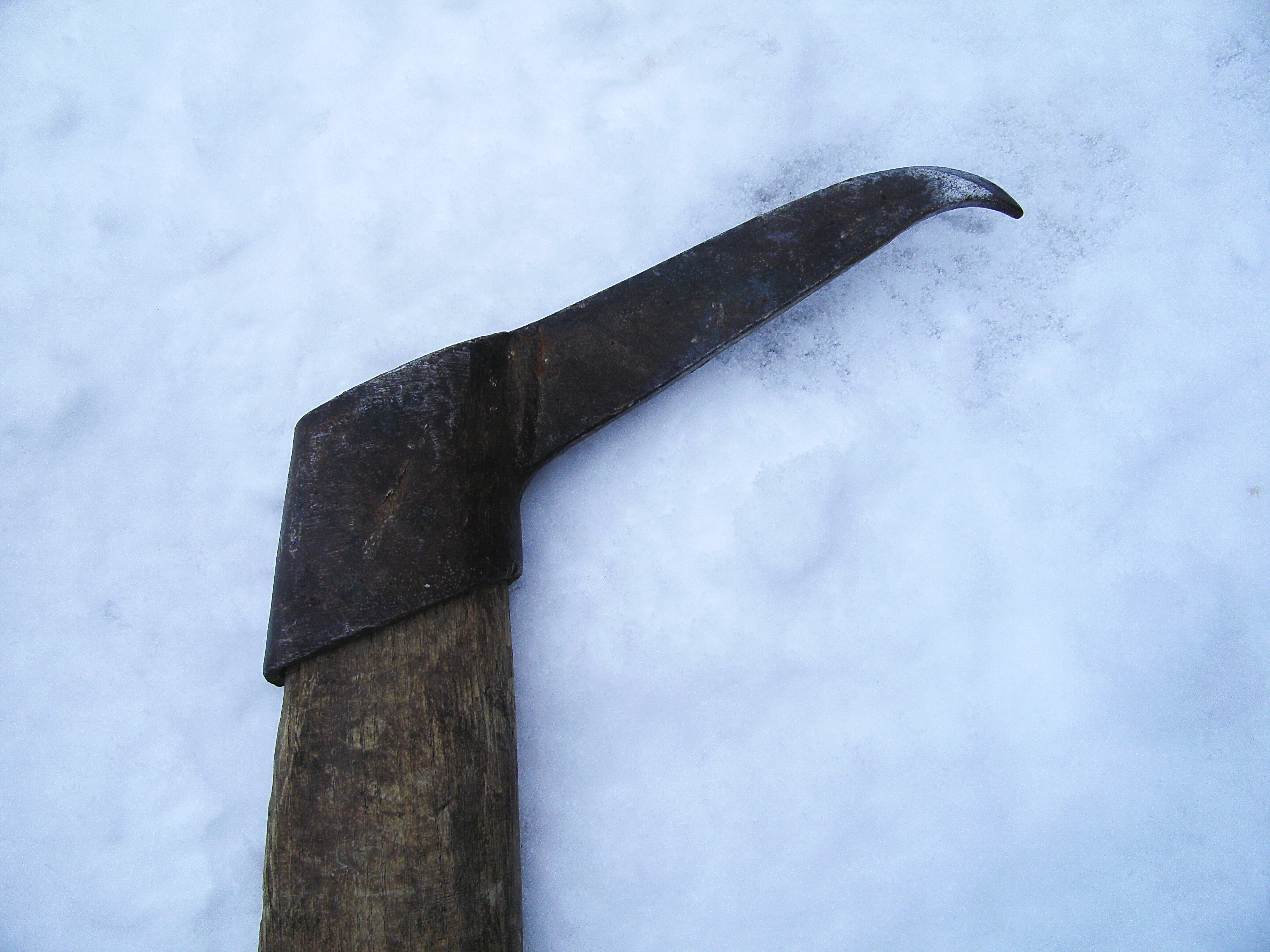 in Jachenau gebräuchliche Form des Sapie mit etwas stärker gekrümmter Spitze, die im Holz erheblich besser "beißt".